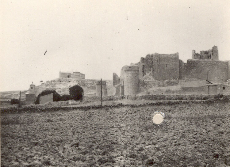 Vista panorámica - Trigueros del Valle (Valladolid) - Cuaderno. Álbum de Valladolid - Fotografía 60 x 42 B/N